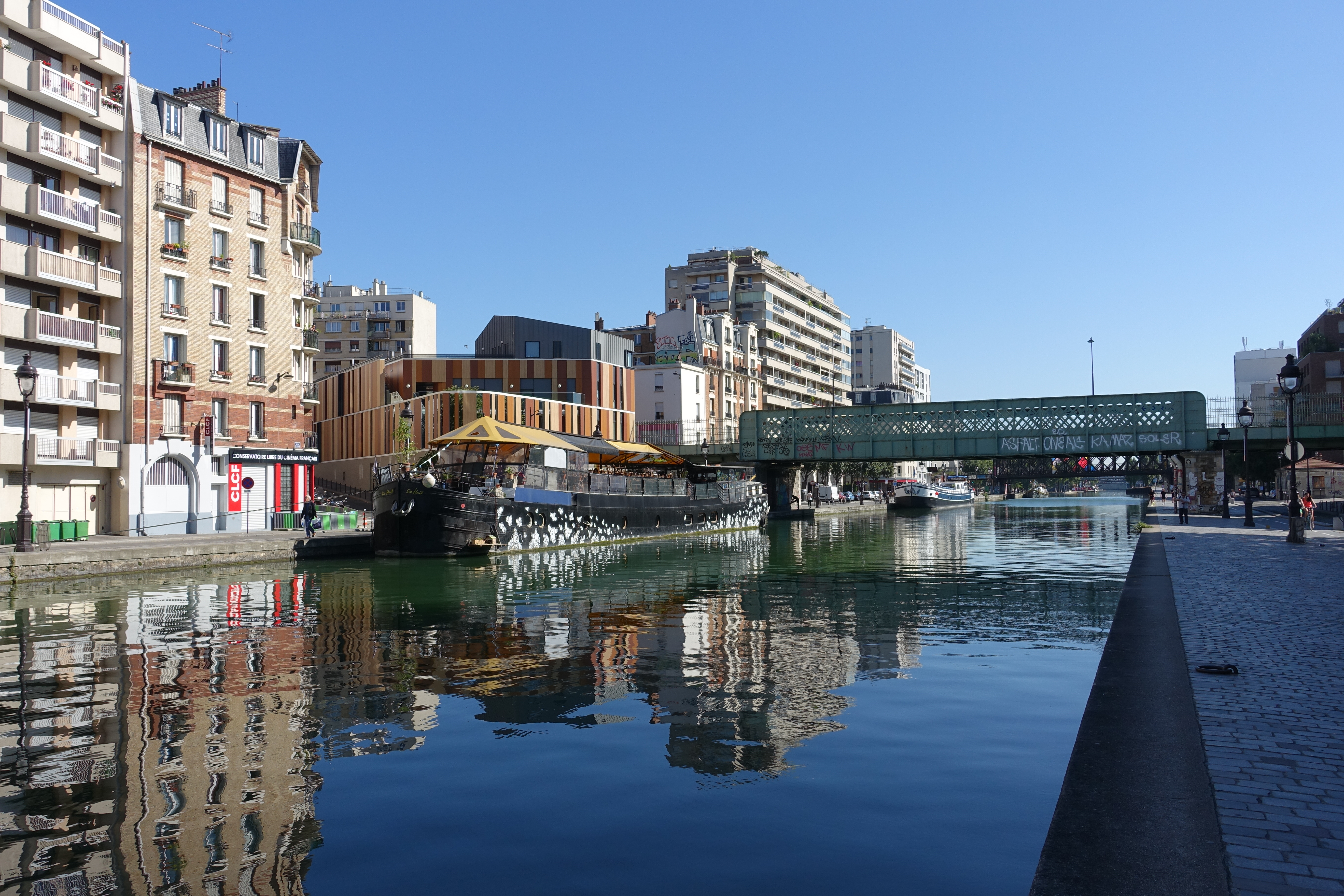 Canal de l'Ourcq @ La Villette @ Paris